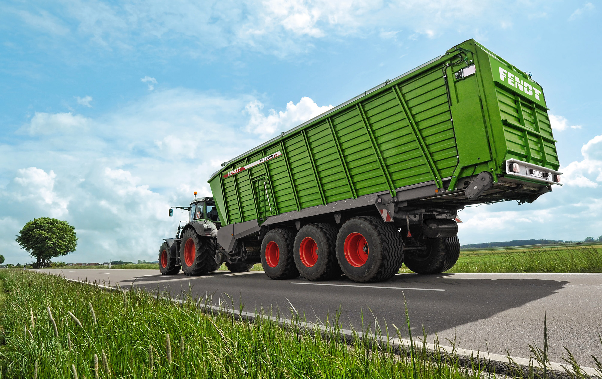 Fendt Tigo 100 XR